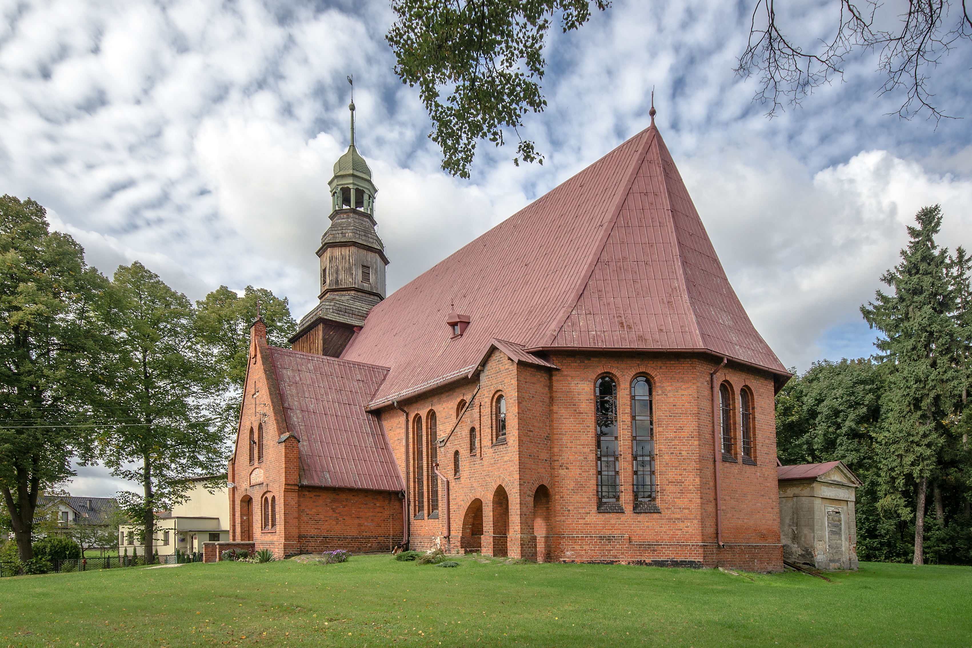 Dobra, kościół ewangelicki, ob. rzym.-kat. par. pw. NMP z Góry Karmel, 1904; wieża 1670